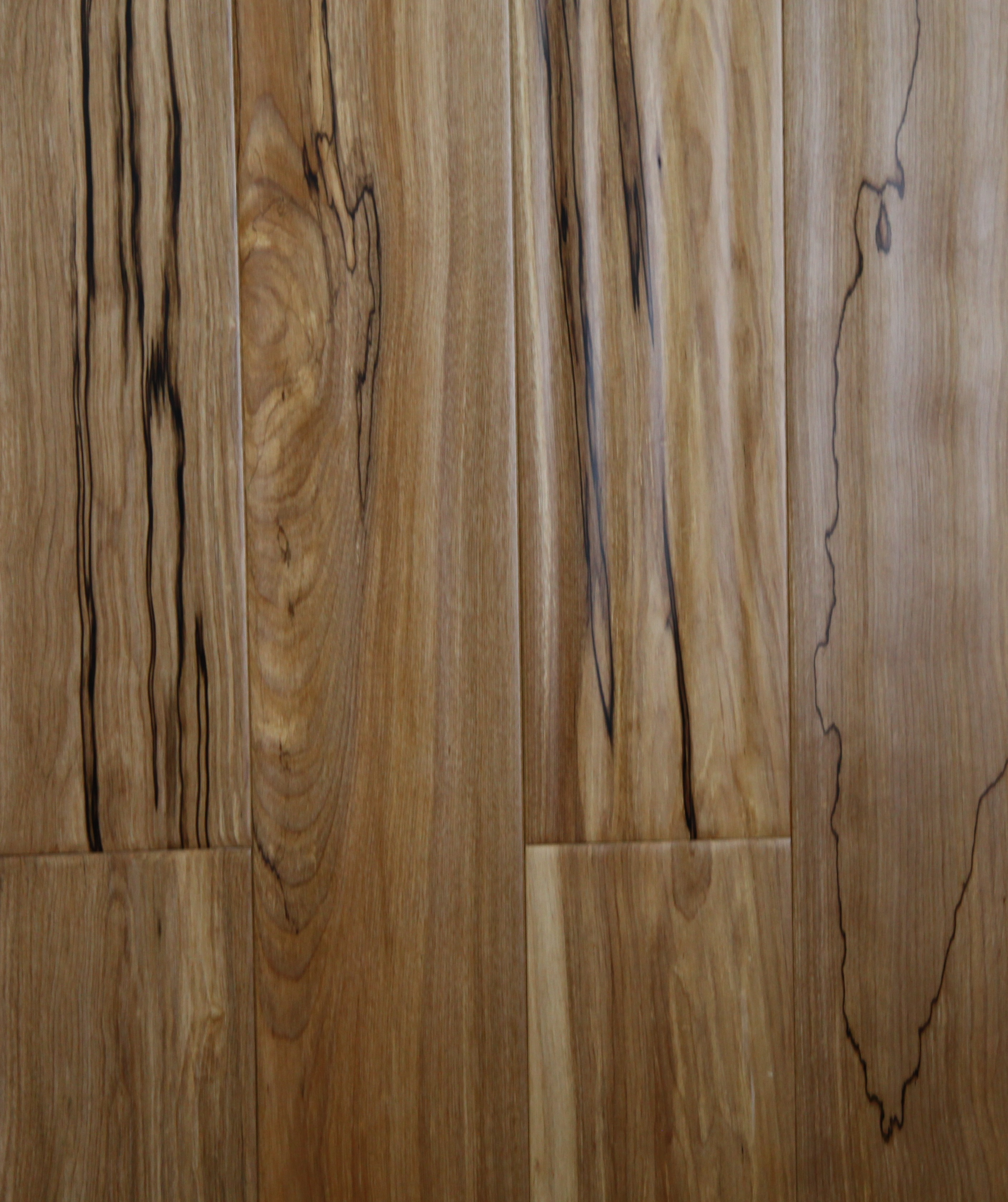 Берёза без тонирования эффект строгания